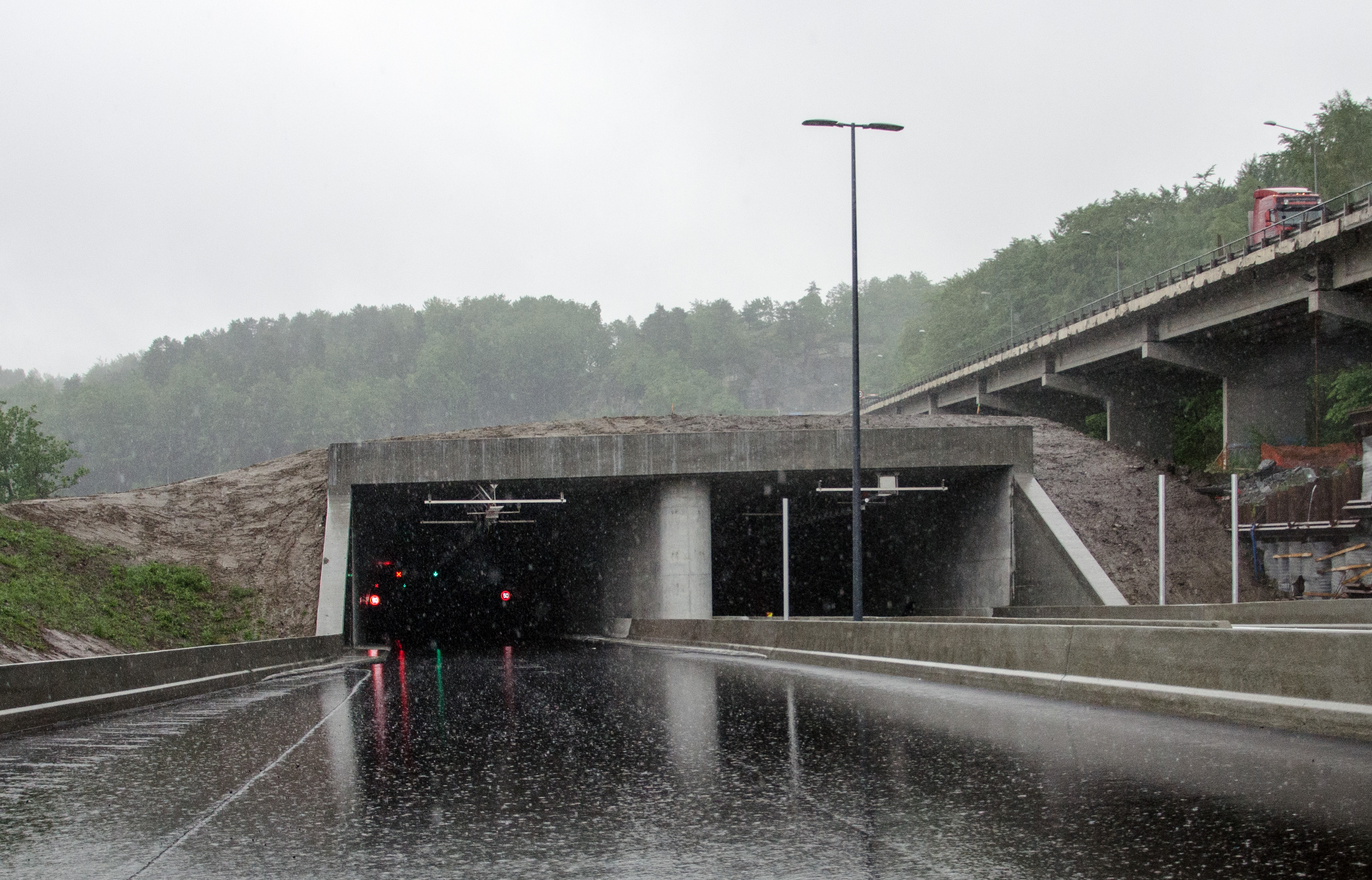 Larvikstunnelen